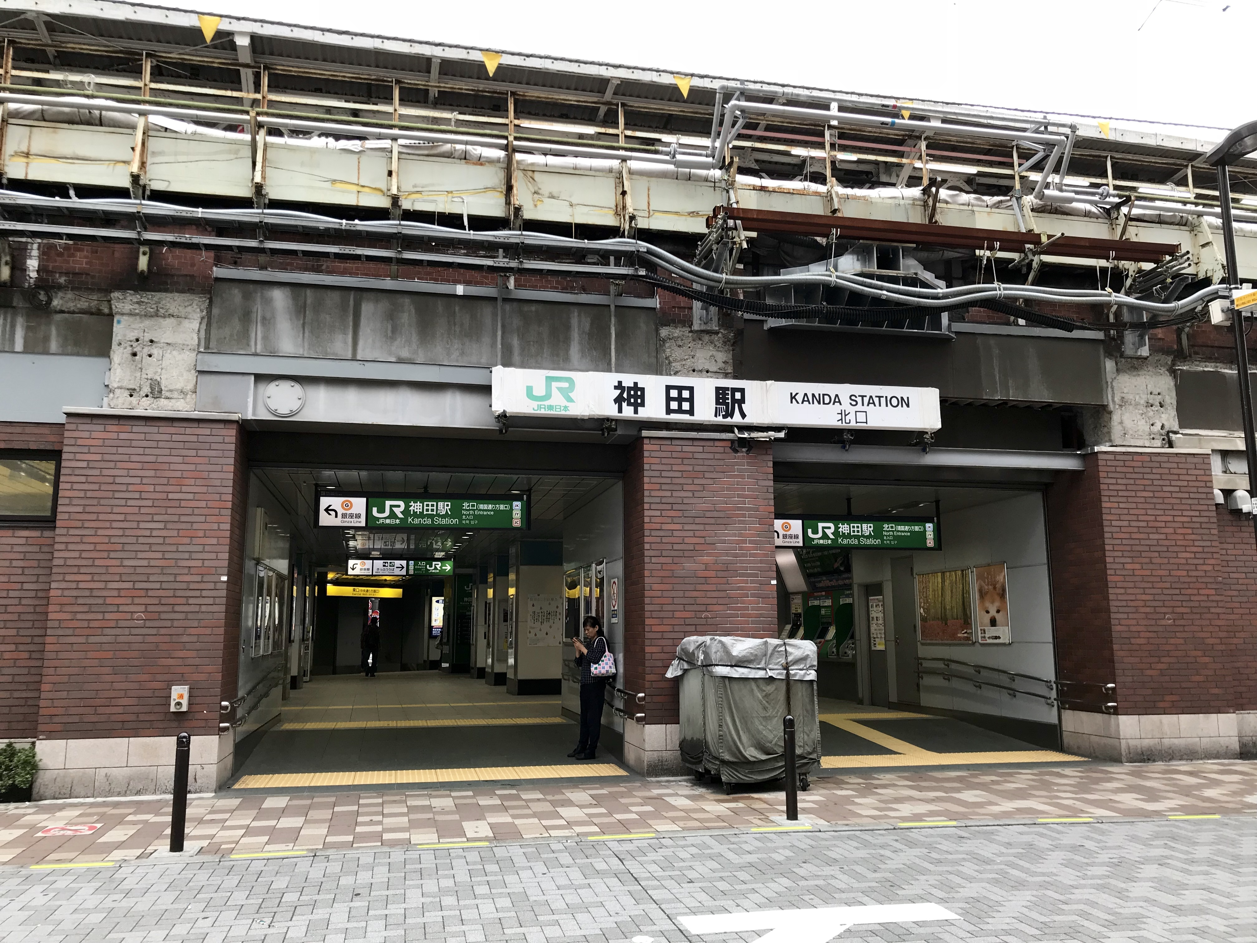 JR東日本神田駅北口（2018年）